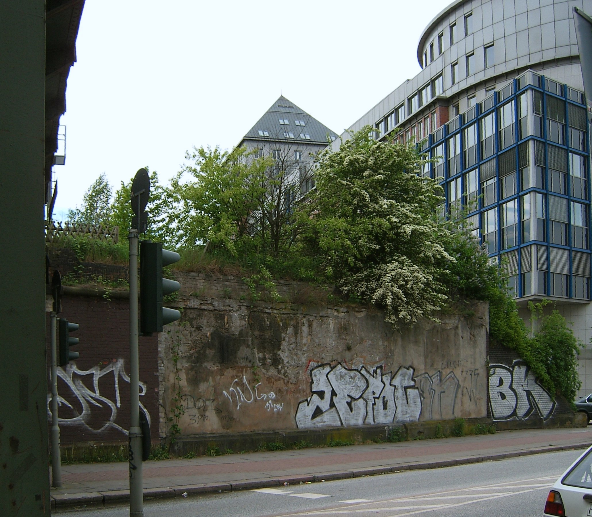 Widerlager der ehemaligen U-Bahn-Brücke in Rothenburgsort. Links ist die S-Bahn-Brücke zu sehen.